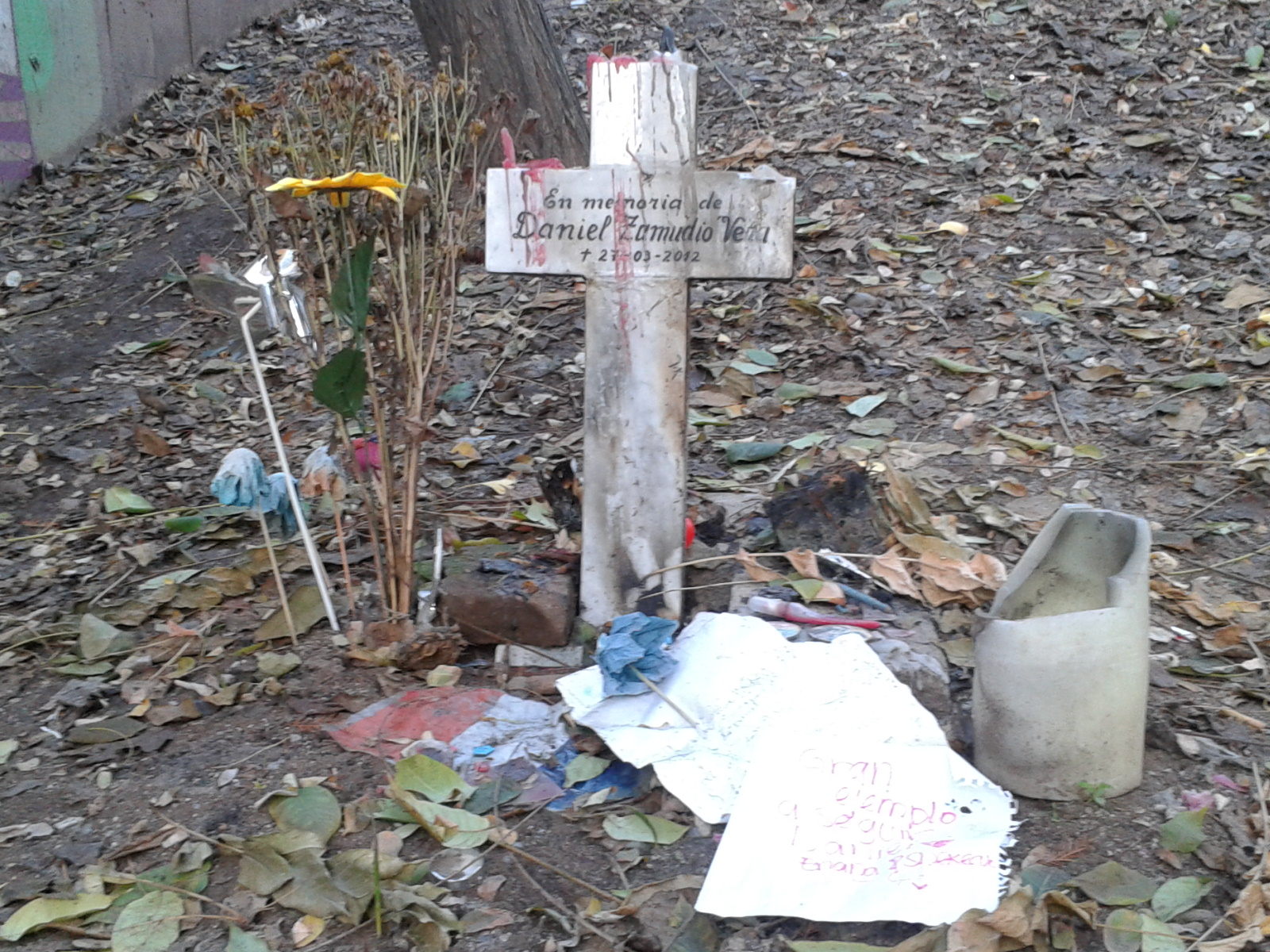 Animita de Daniel Zamudio, Parque San Borja, Santiago de Chile.